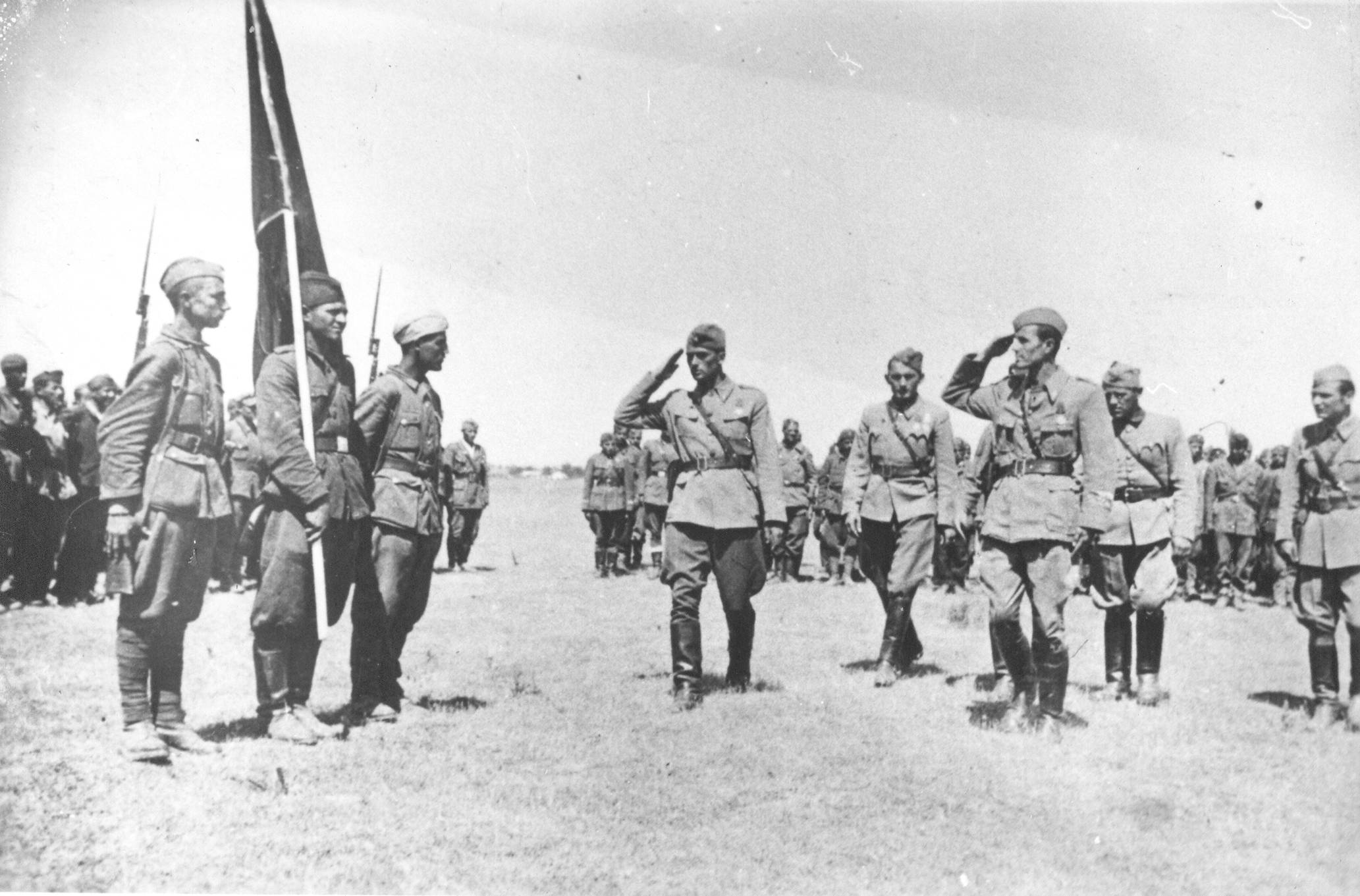 Schieramento della 48. Divisione macedone dell'Esercito popolare di liberazione della Jugoslavia sul fronte dello Srem nell'aprile 1945